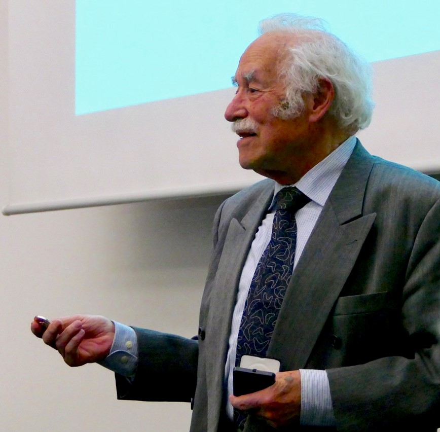 Verleihung der Lappenberg-Medaille in Hamburg an Prof. Dr. Ulrich Bauche am 10.4.2019